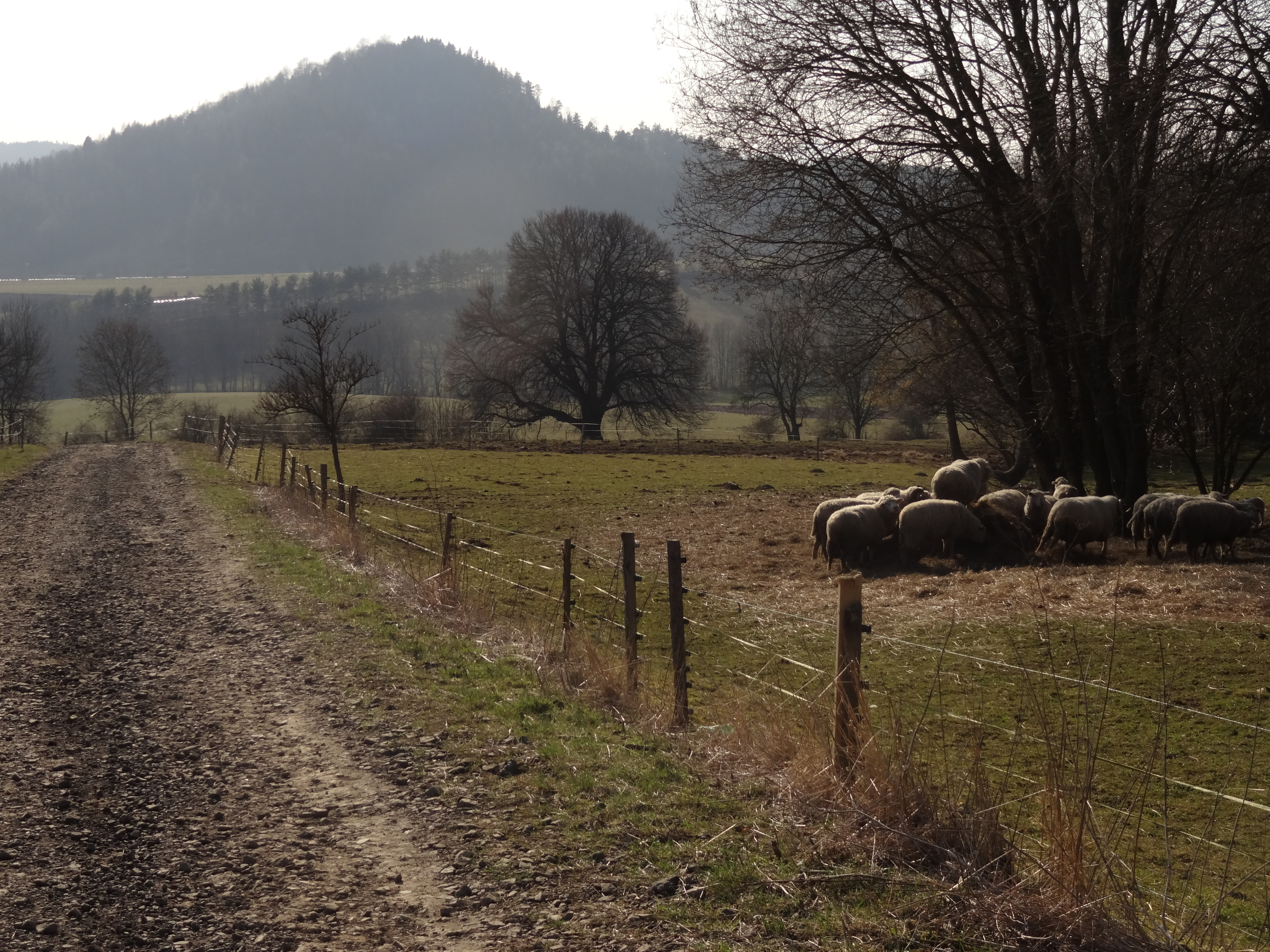 Památná lípa Karolinka nad Javorníkem poblíž samoty U Dědků